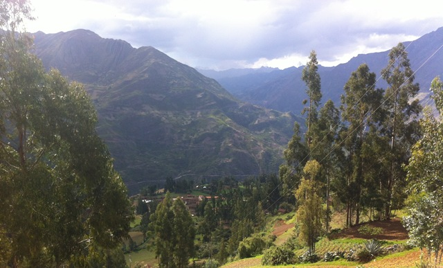 Vista de la ciudad desde el lado sur este